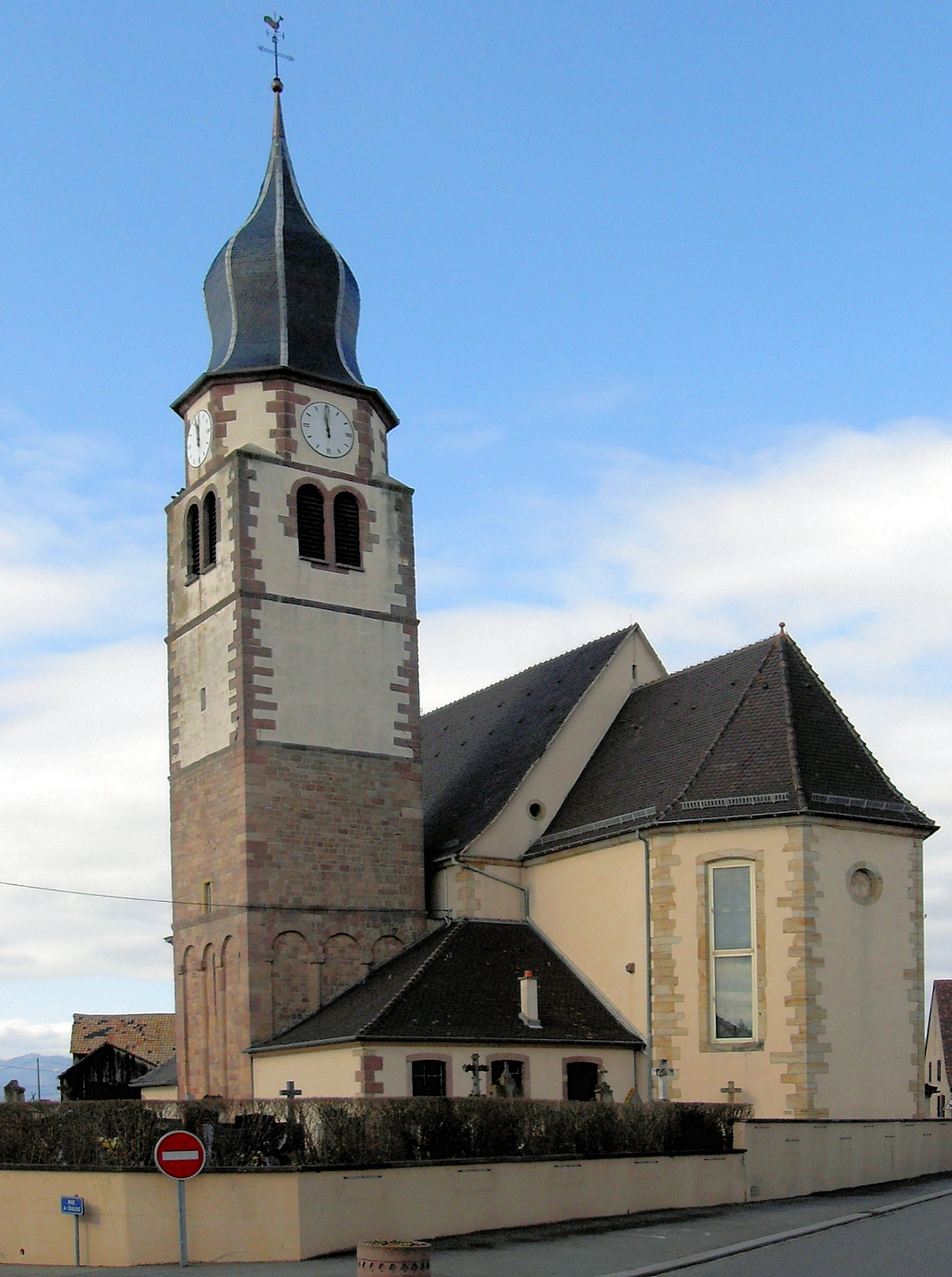 L'église Saint-Michel d'Ungersheim